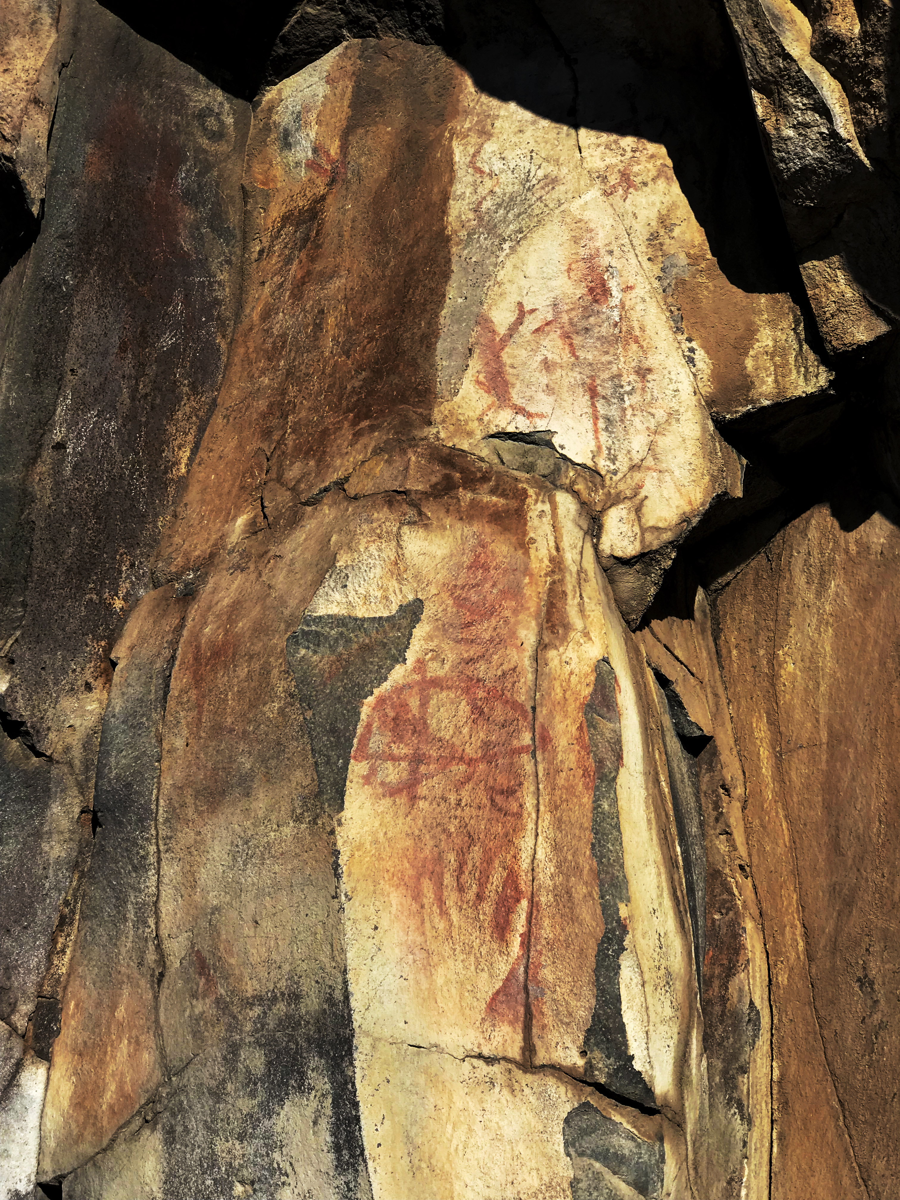 Pinturas rupestres de las Peñas de Cuxtepec en el municipio de Tepeapulco, Hidalgo (México).